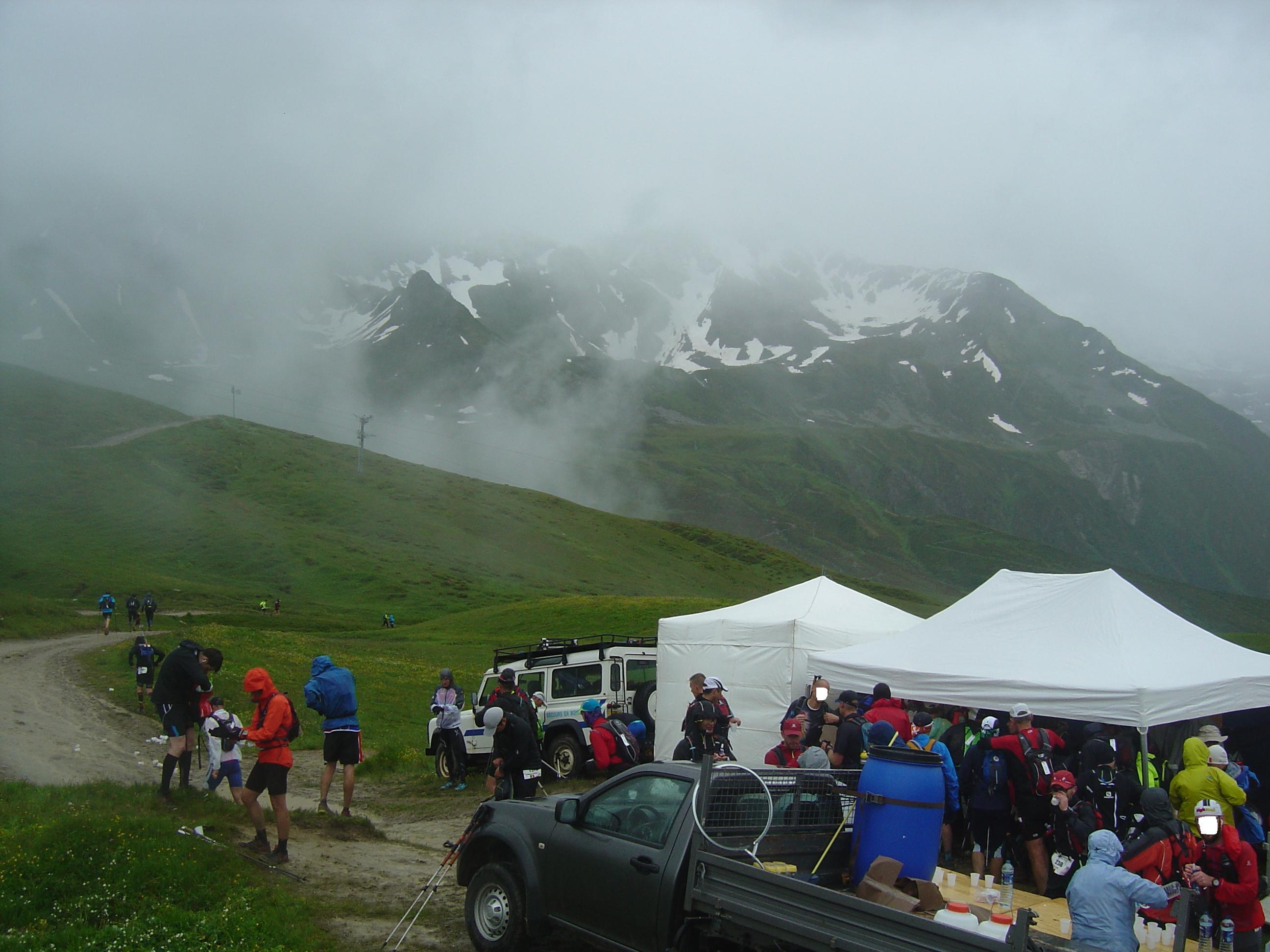 Ravitaillement liquide au col des Posettes (km 21,7; 1997m) sur le Marathon du Mont Blanc 2014. La course n'est pas montée à l'aiguille des Posettes à cause du froid et de la pluie.